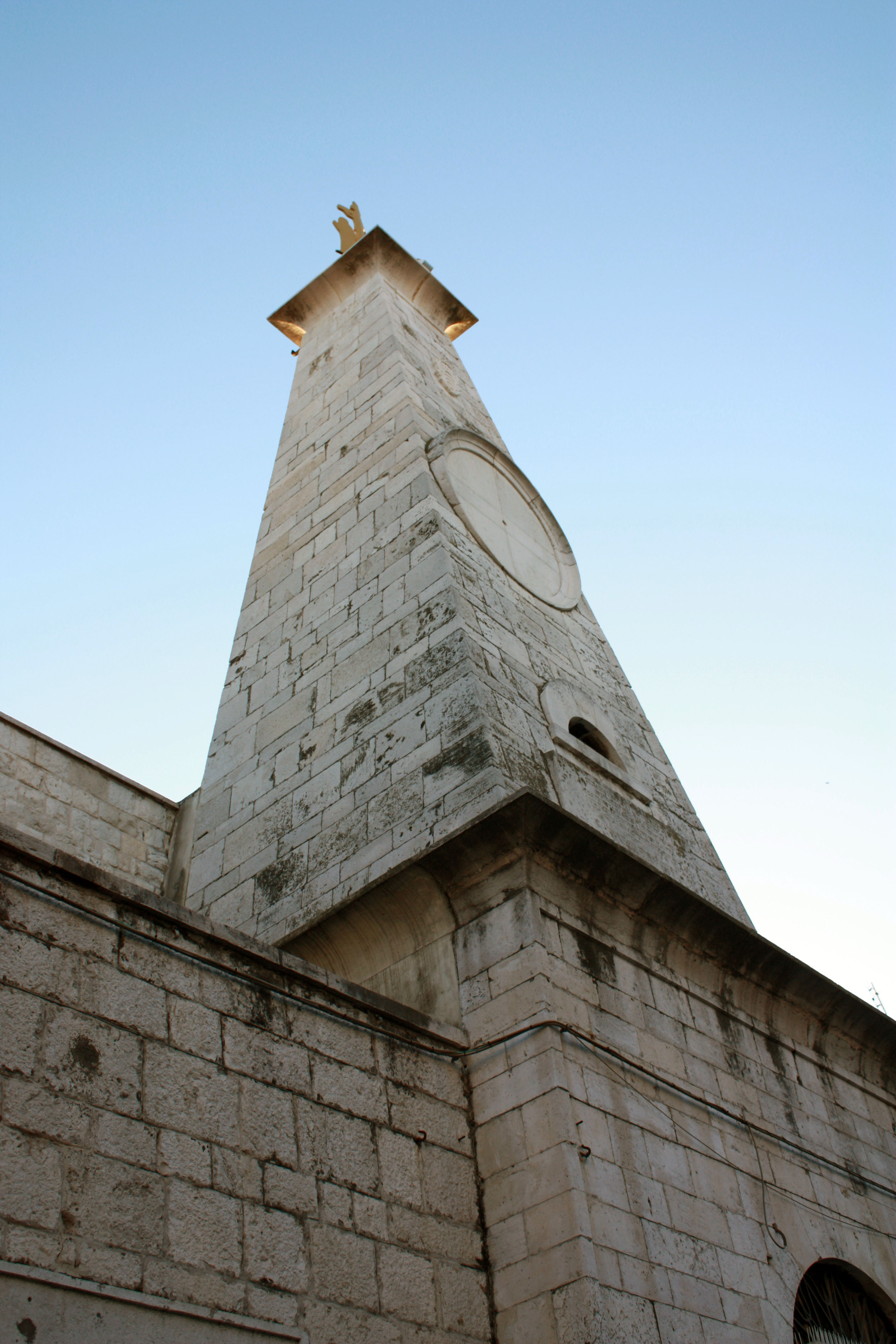 L'obelisco della Chiesa di San Giacomo sul prospetto su Corso Vittorio Emanuele.